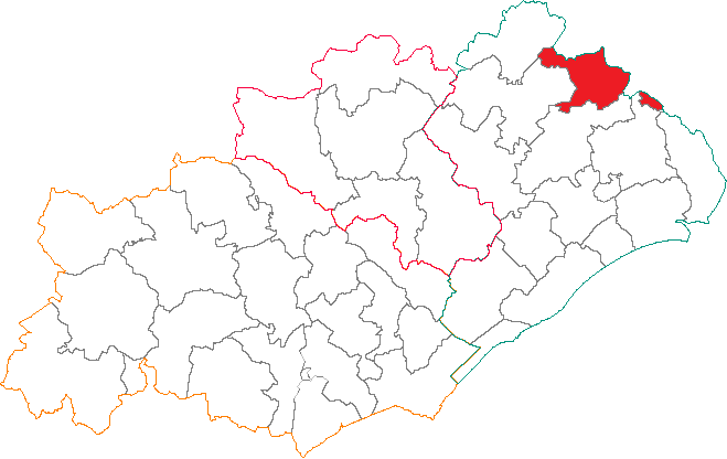 Situation du canton dans le département de l'Hérault.